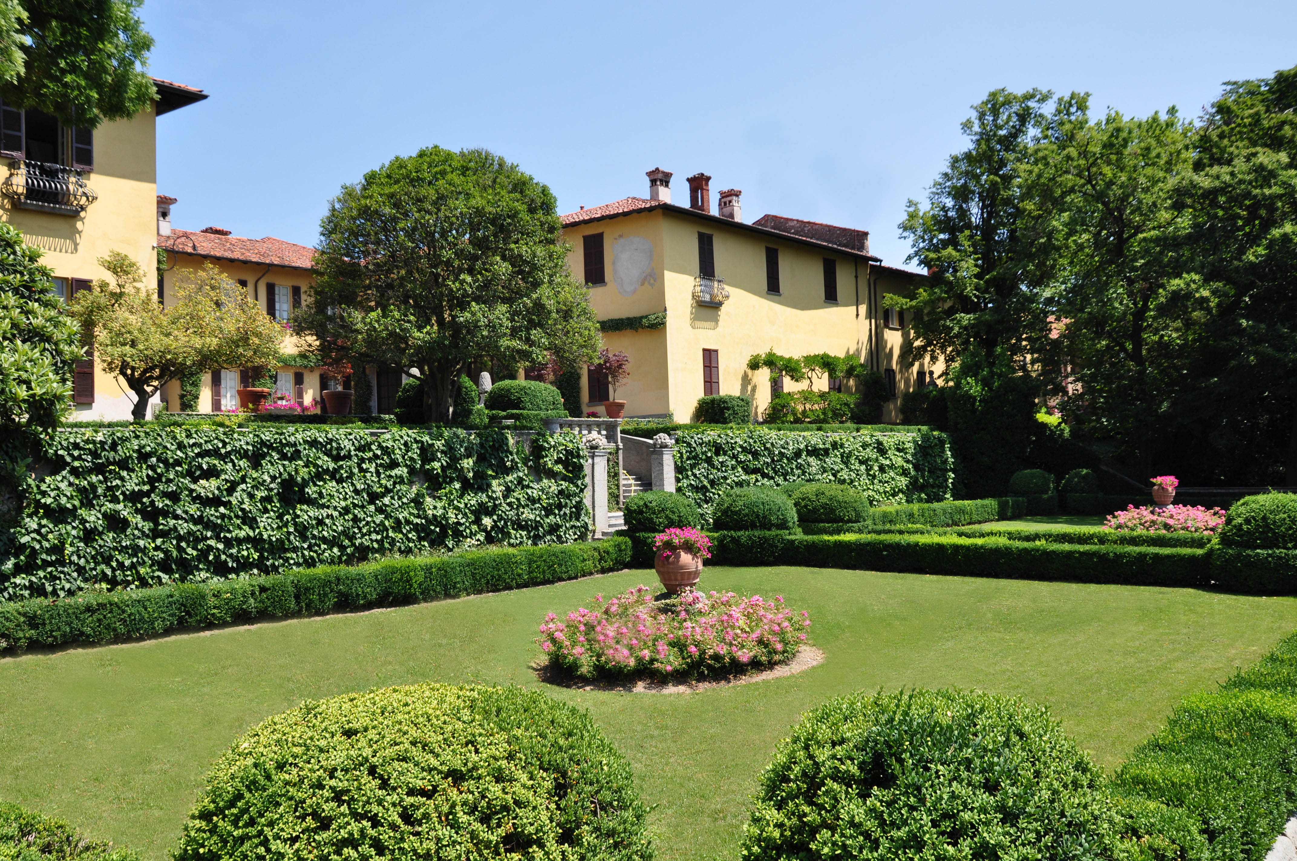 vista lato ovest di villa la vescogna dal giardino